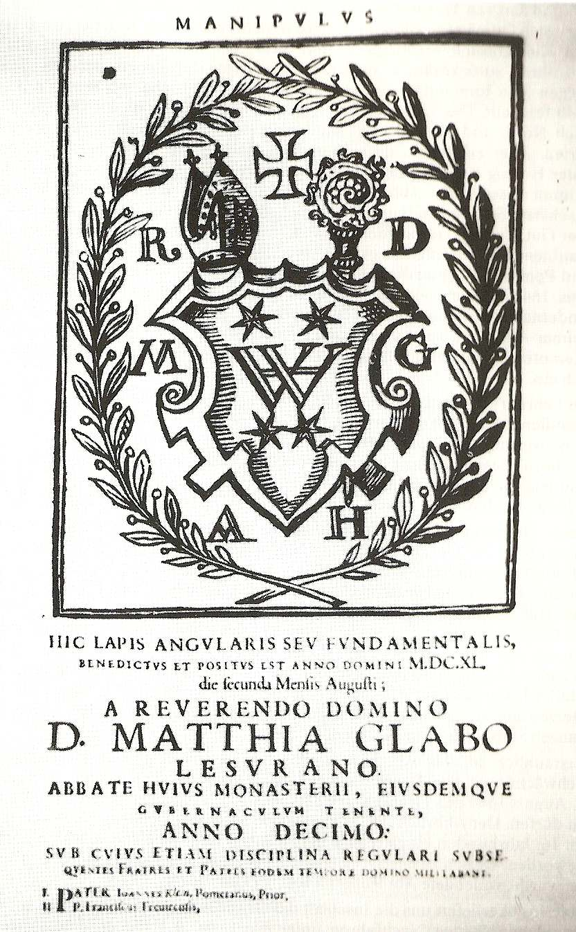 Grundsteinlegungsurkunde zum Neubau von Kloster Himmerod vom 2. August 1640 unter Abt Matthias Glabus